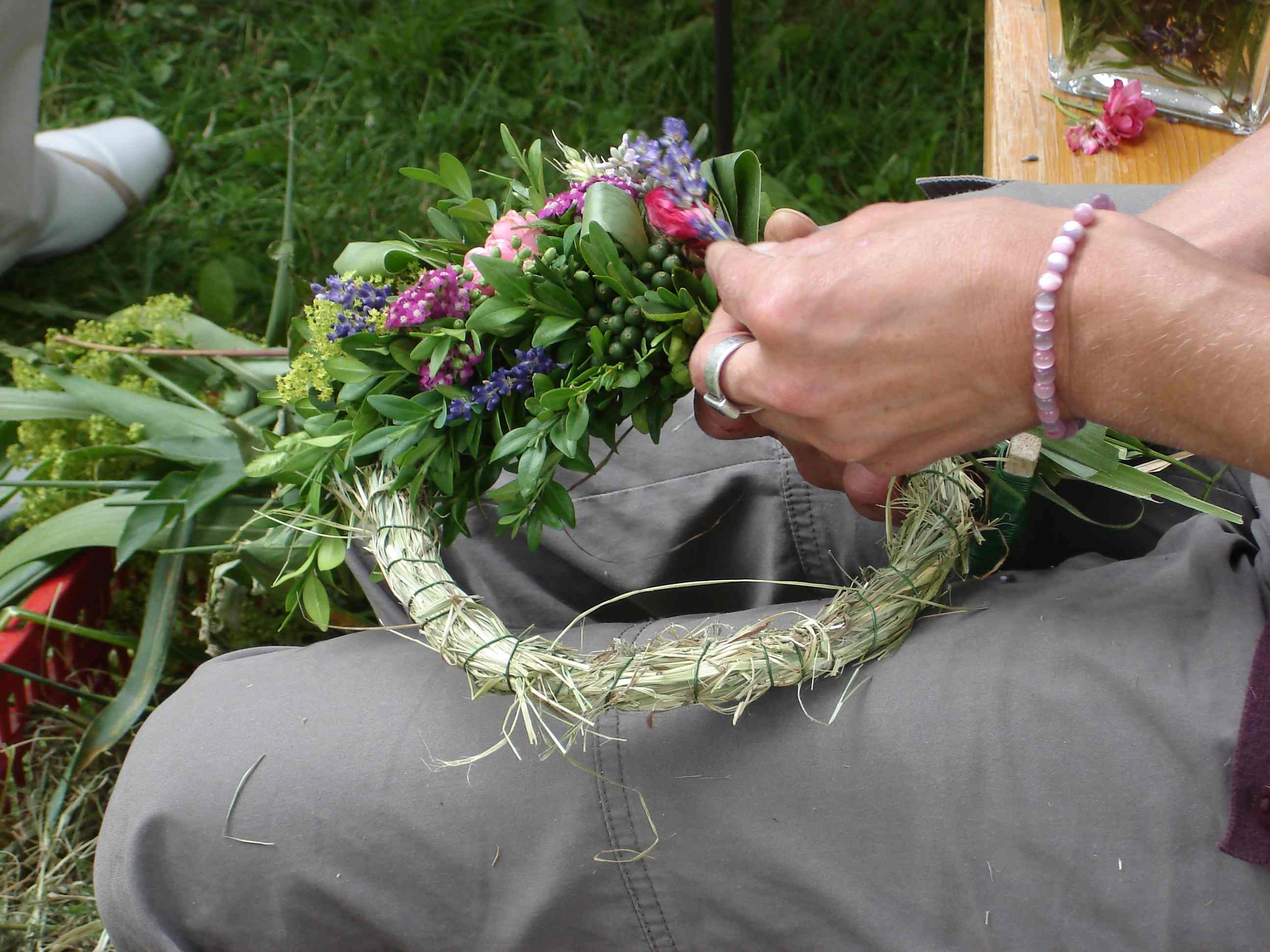 Kräuterfest Maihingen